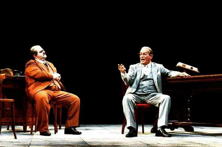 Massimo Cagnona ed Eros Pagni